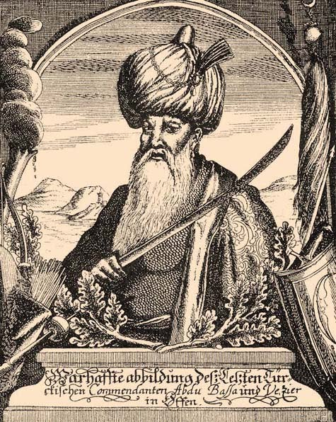 Abdi Abdurrahman pasa, más néven Arnaut vagy Abdi (1615–1686), az utolsó budai pasa Buda 1686-os visszafoglalásakor hősiesen védte a várat a keresztény seregekkel szemben.